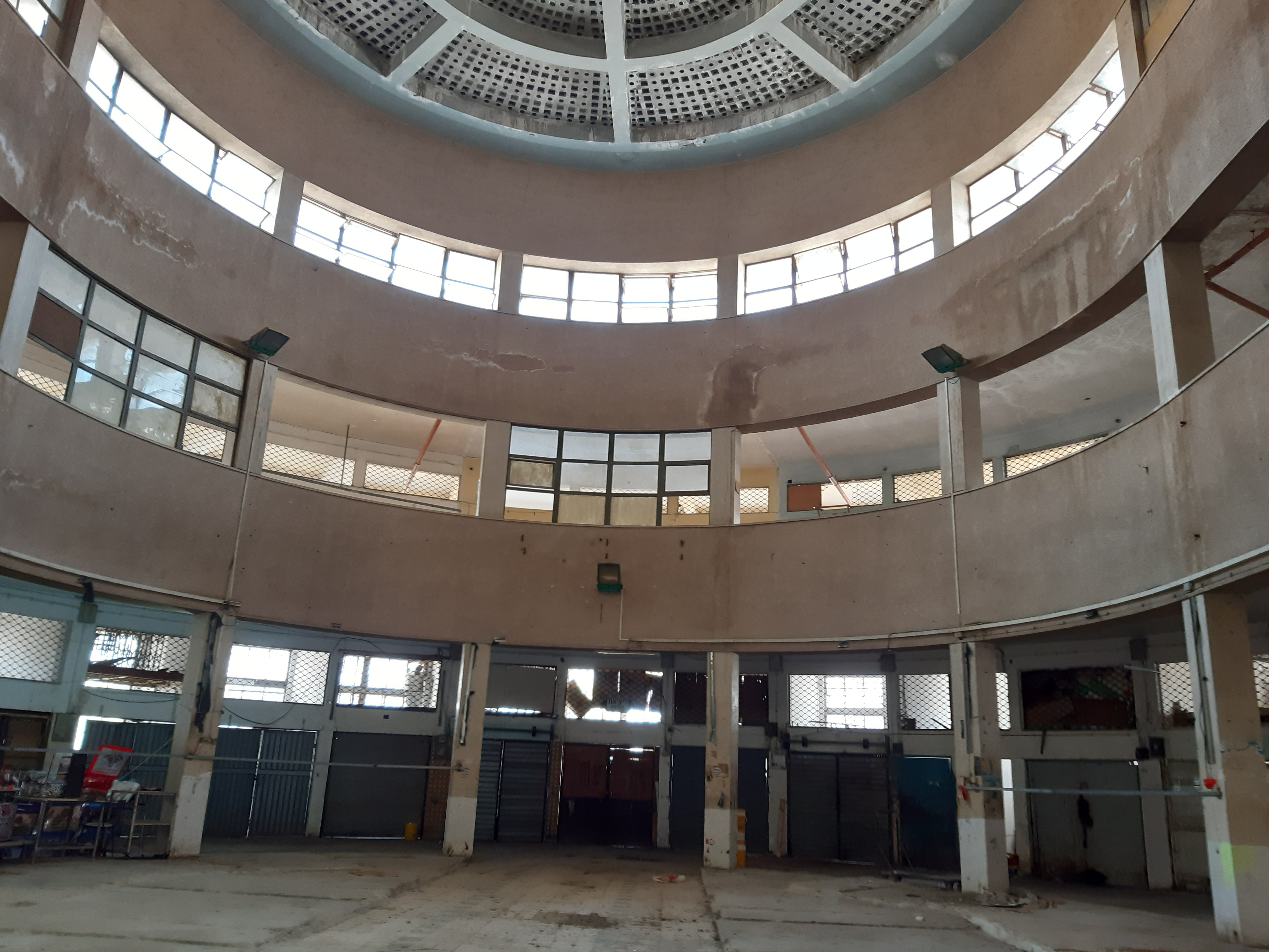 בניין שוק תלפיות בשכונת הדר הכרמל בחיפה , נחנך ב-9 באפריל 1940. אדריכל המבנה: משה גרסטל